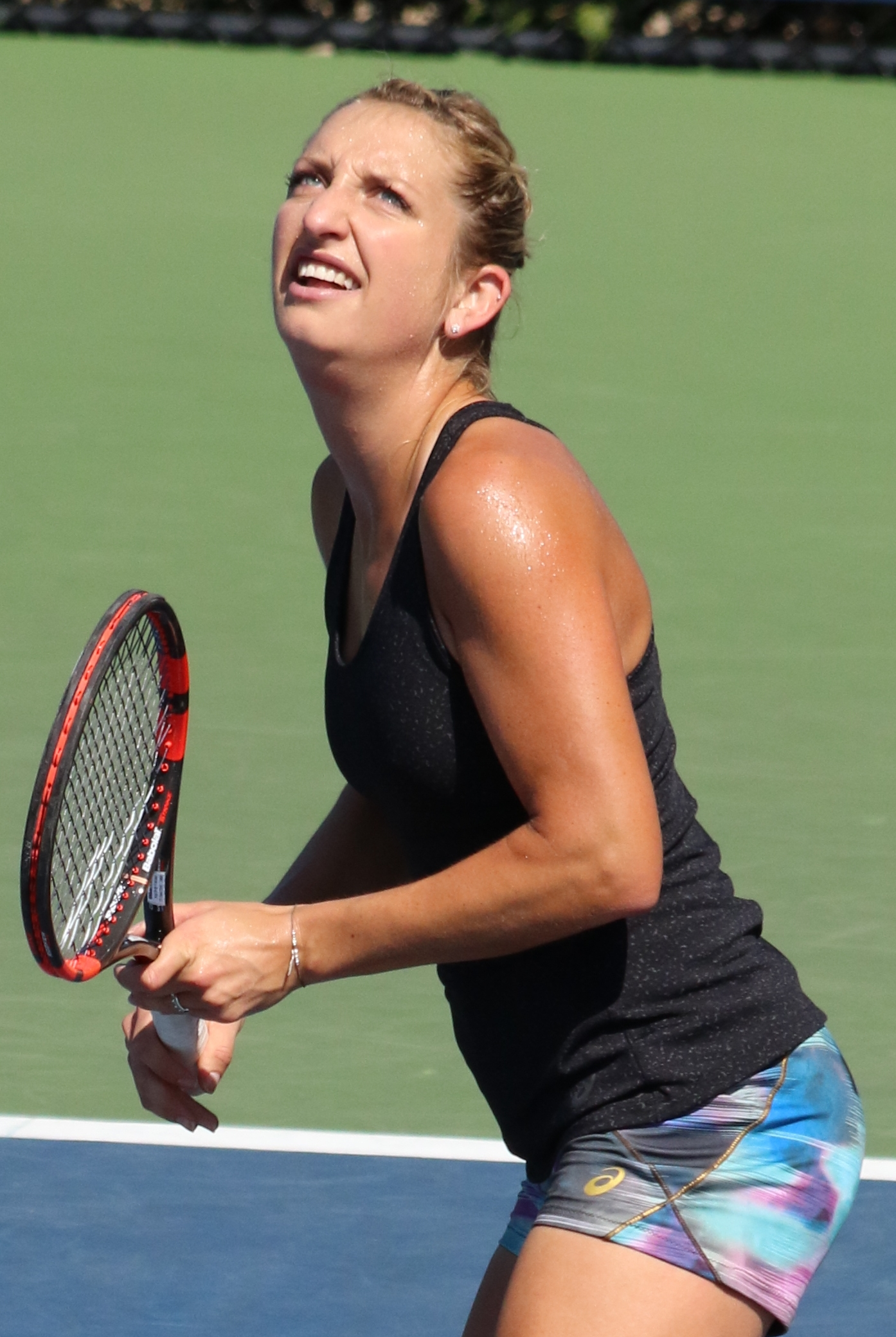 Bacsinszky US16 (8)